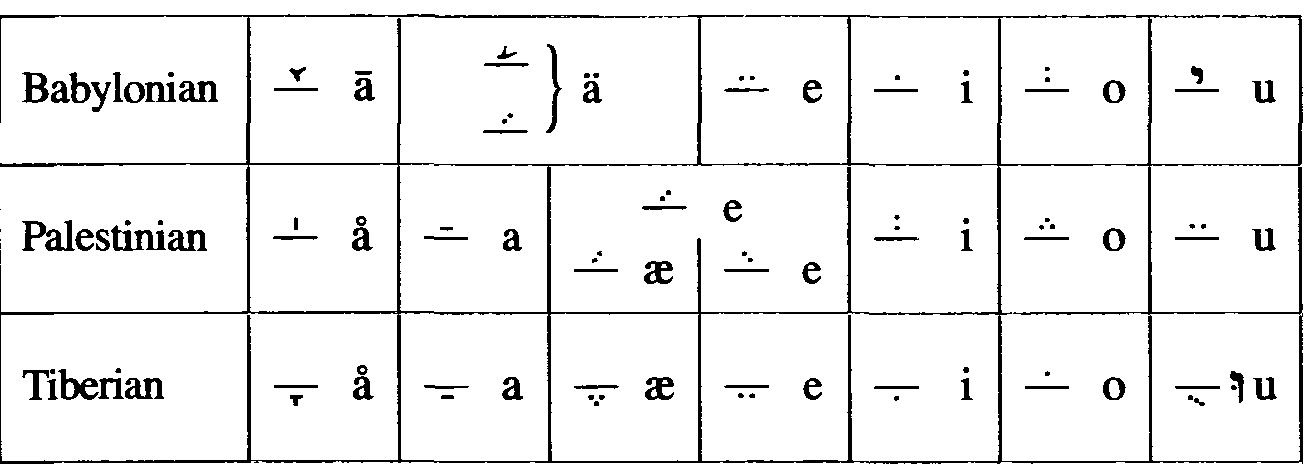 Знаки огласовок в масоретском тексте